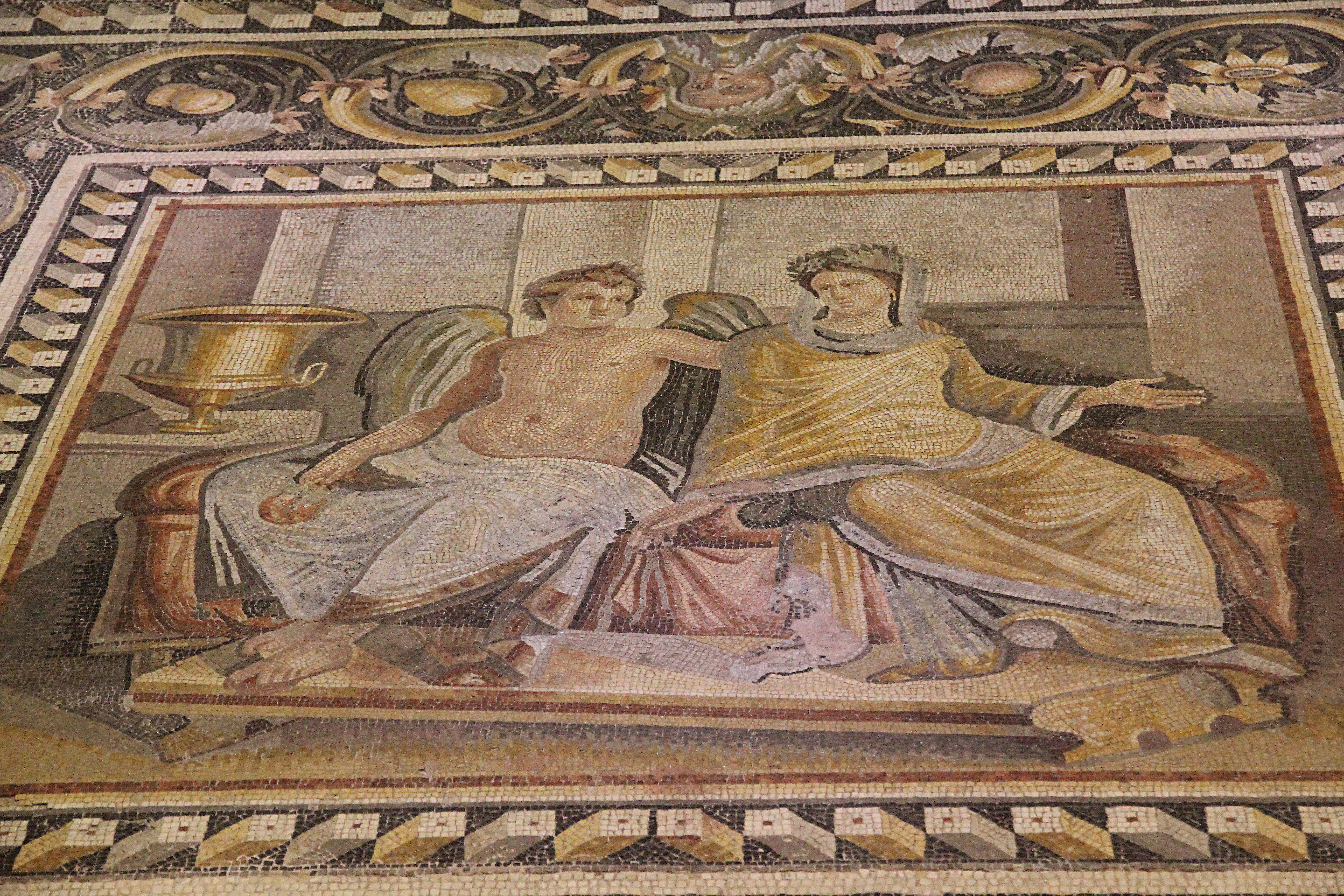 Zeugma-Mosaik-Museum, Gaziantep, Türkei, Eros und Psyche, Mosaik aus dem "Haus des Poseidon" in Zeugma, 2./3. Jahrhundert